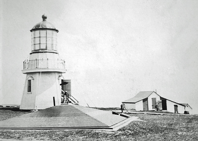 La première version du deuxième phare du Rocher-aux-Oiseaux, construit en 1887 et modifié en 1908.